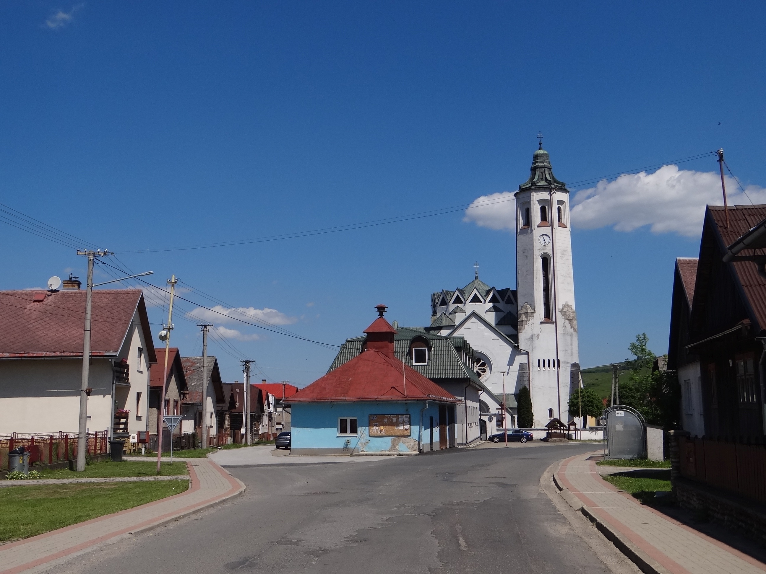 Jakubany